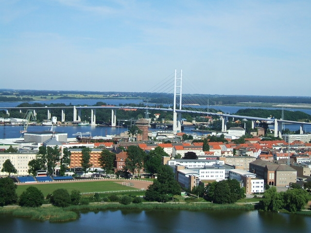 Strelasundquerung